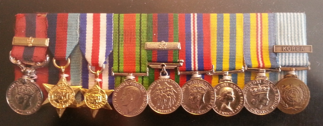 Agrafe de Léo Major. De gauche à droite: Distinguished Conduct Medal (DCM) avec barette Étoile 1939-1945 Étoile France et Allemagne Médaille de la Défense Médaille du service volontaire Médaille de la guerre 39-45 Médaille de Corée Médaille du service volontaire pour la Corée Médaille des Nations-unies pour la Corée